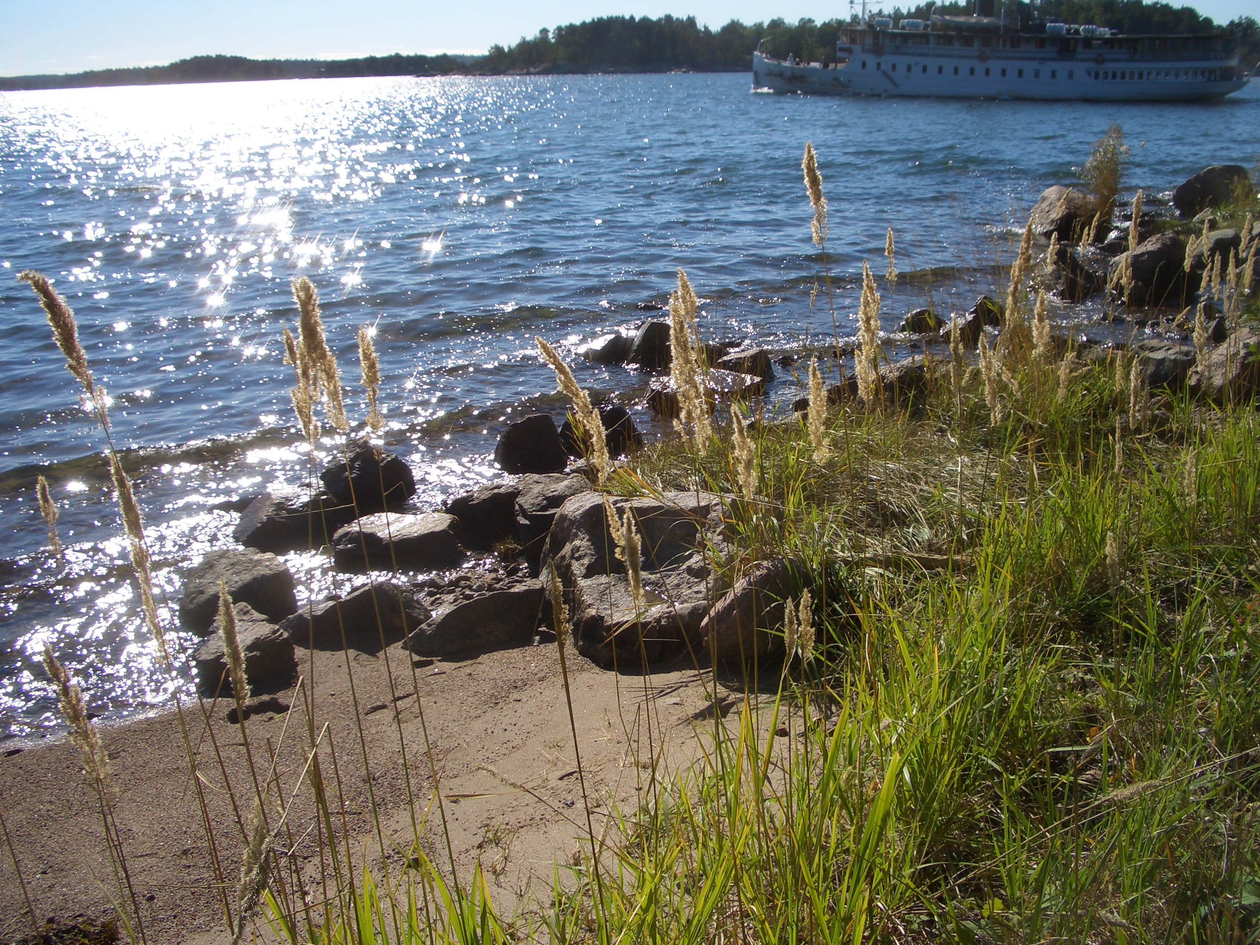 Beach at Södra Grinda, Stockholm archipelago. Photo by Brion Vibber, September 16, 2006.